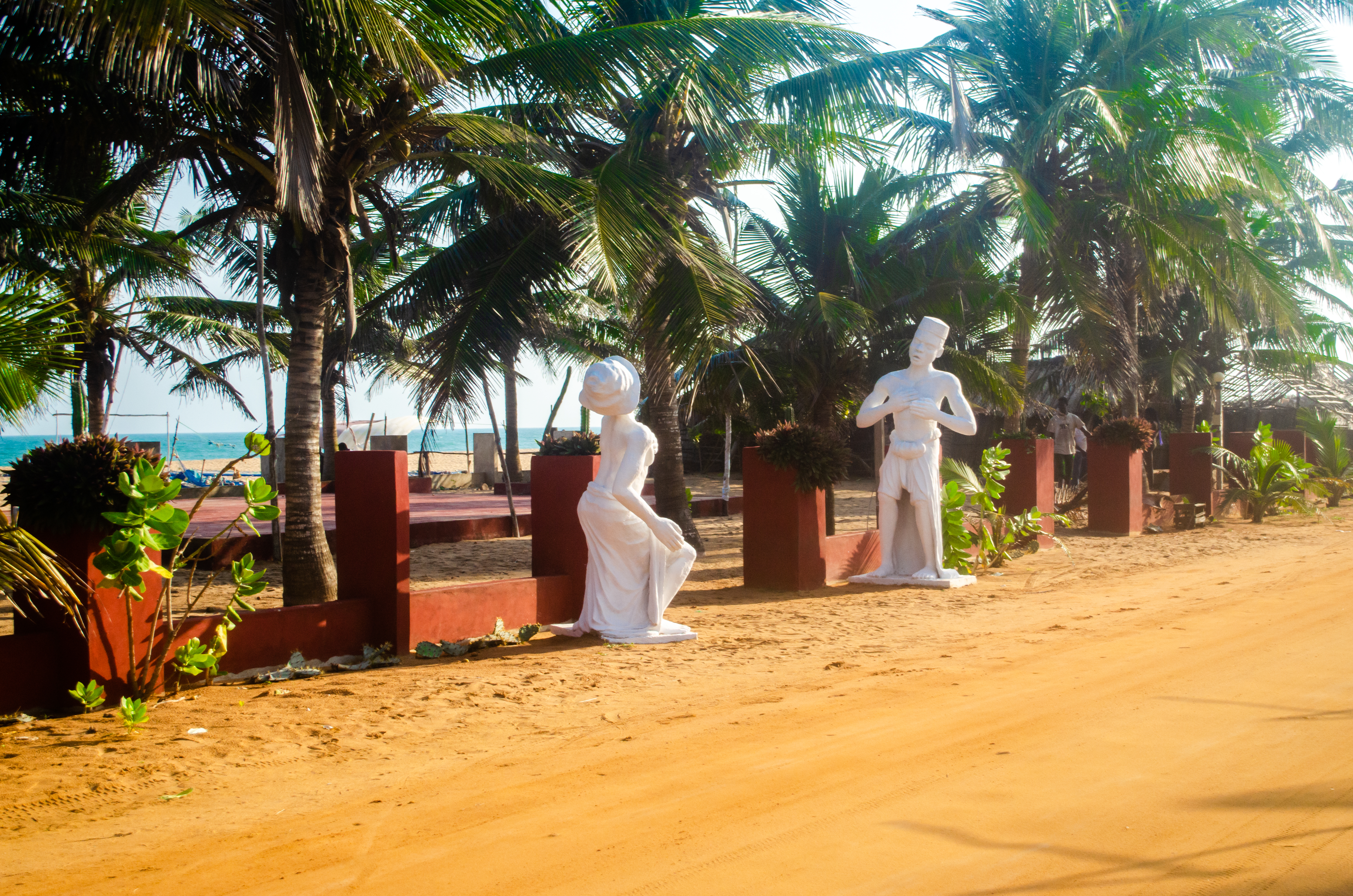 Ecole supérieure de Formation